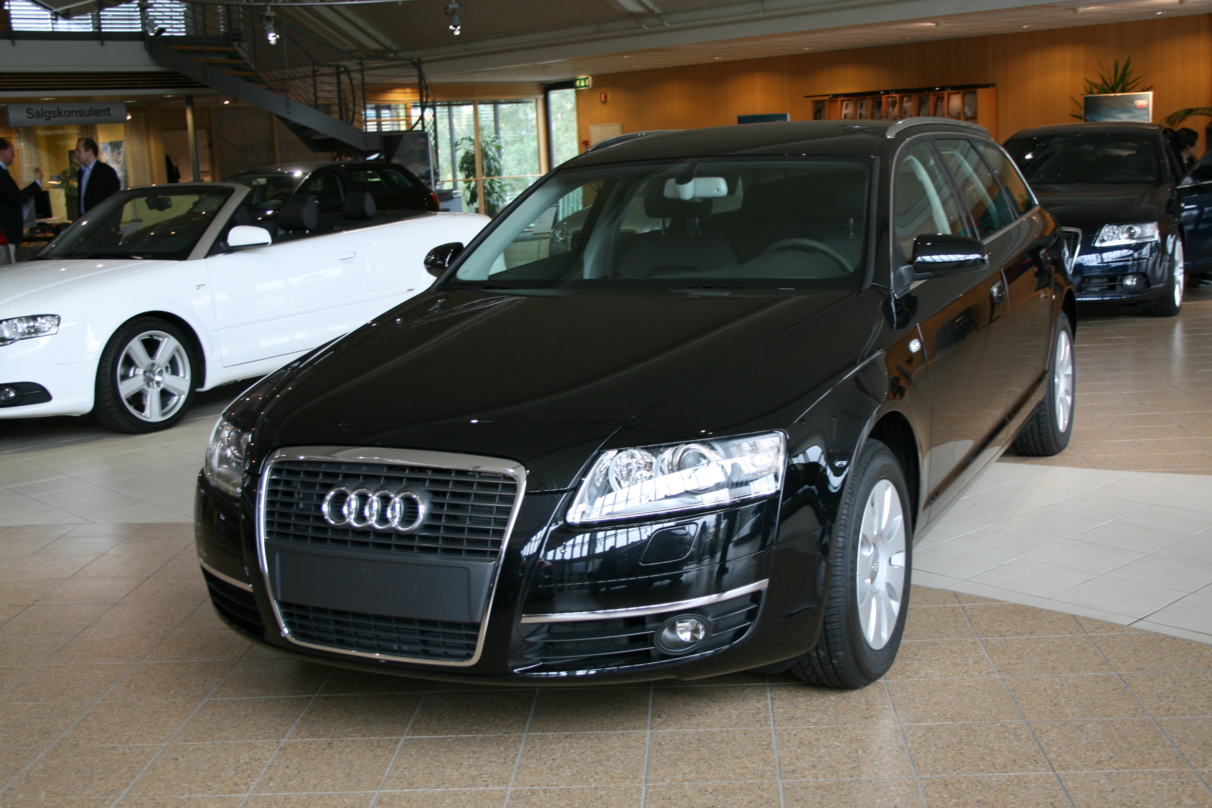 Audi A6 Avant